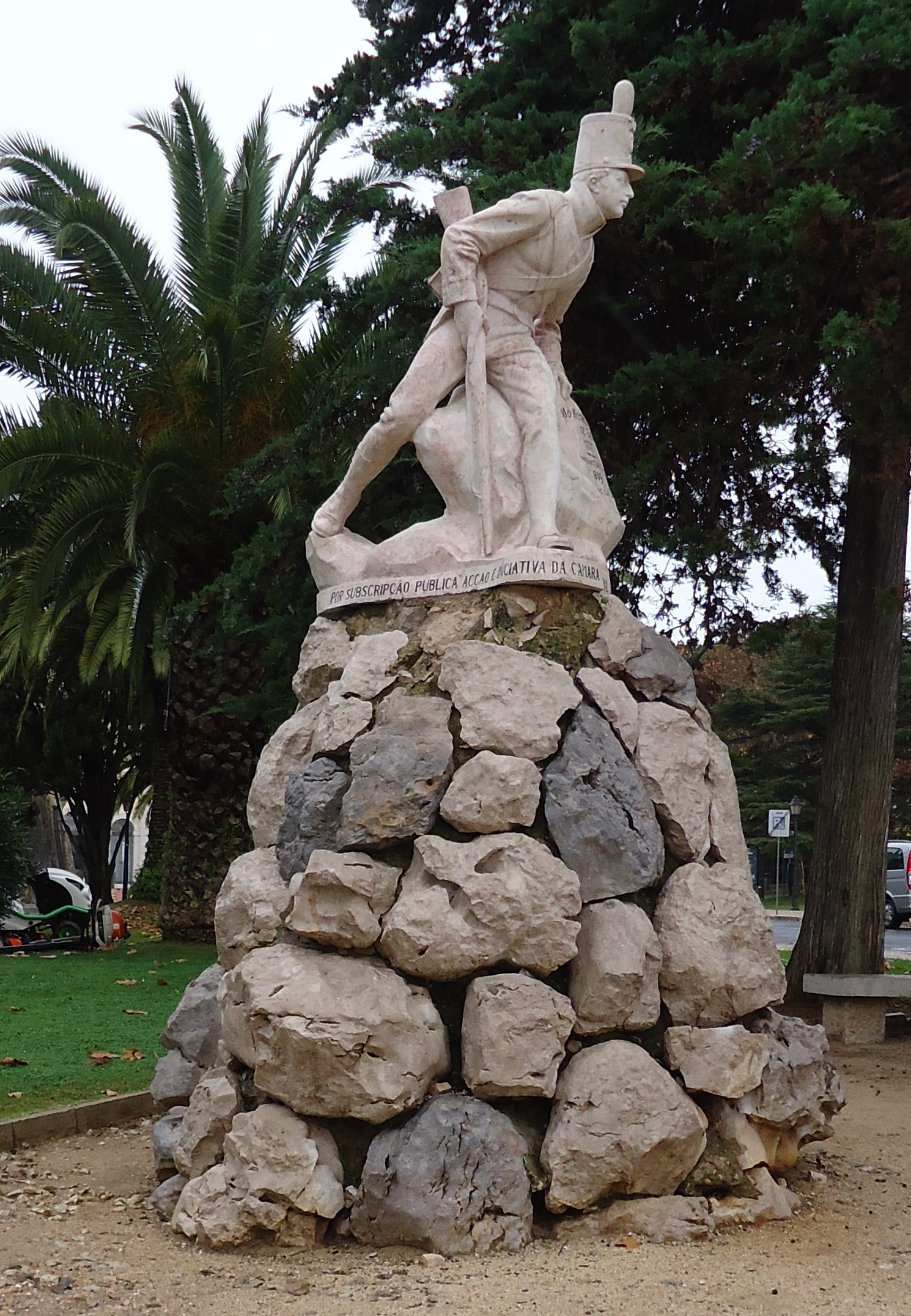 Monumento em homenagem ao Regimento de Cascais, freguesia de Cascais, distrito de Lisboa, Portugal.